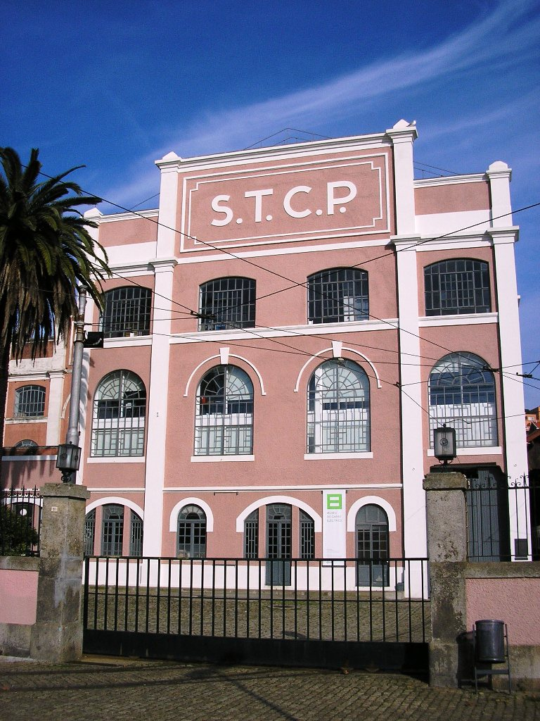 Tramway museum in Porto, Portugal.